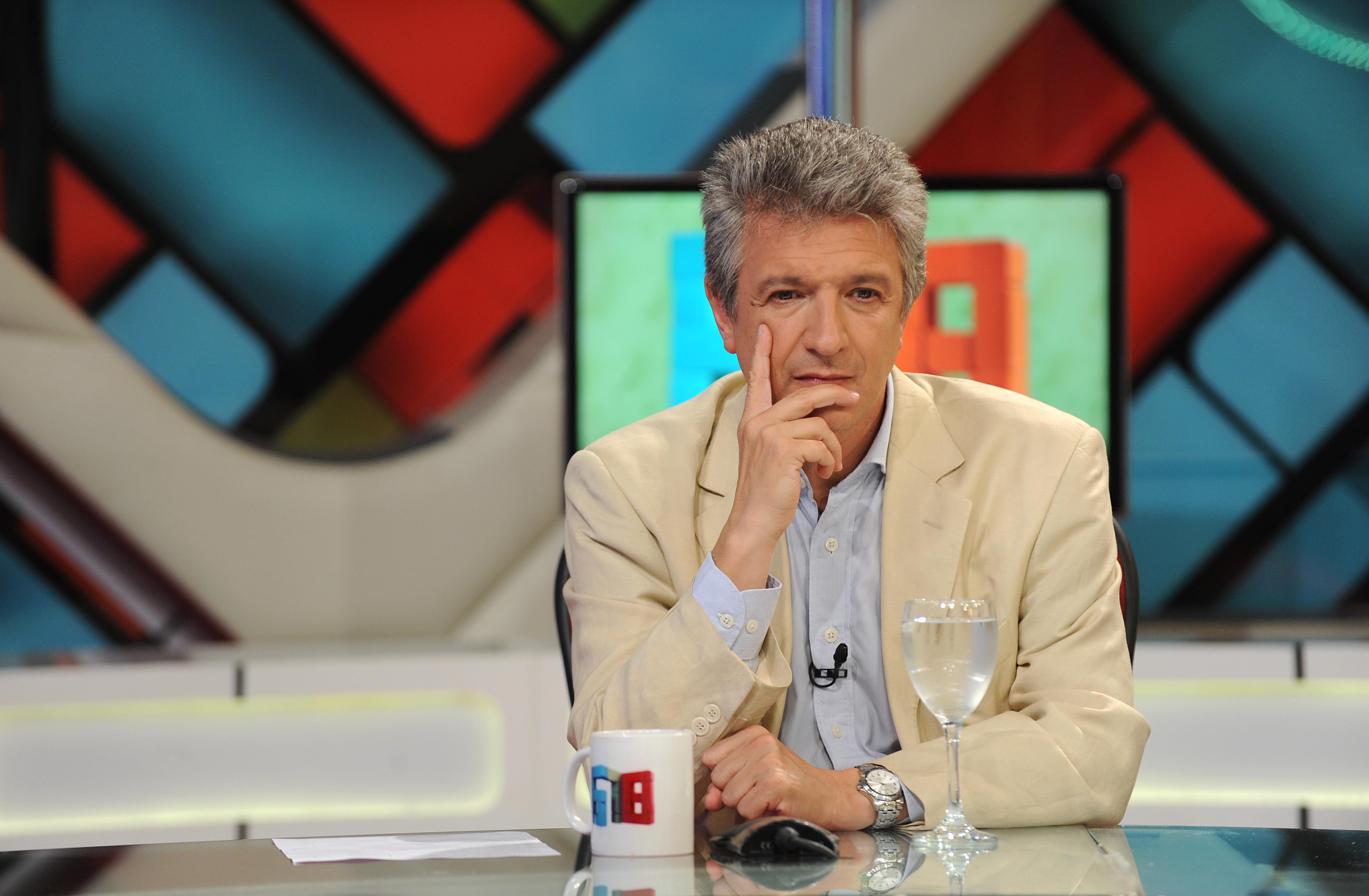 Gustavo López, subsecretario de Presidencia de la Nación.